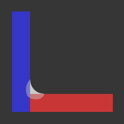 Fillet